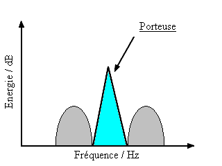 Je suis l'auteur de ce "magnifique" dessin. :-o Tentative d'amélioration de Modulation_AM.PNG de la page sur la "porteuse"